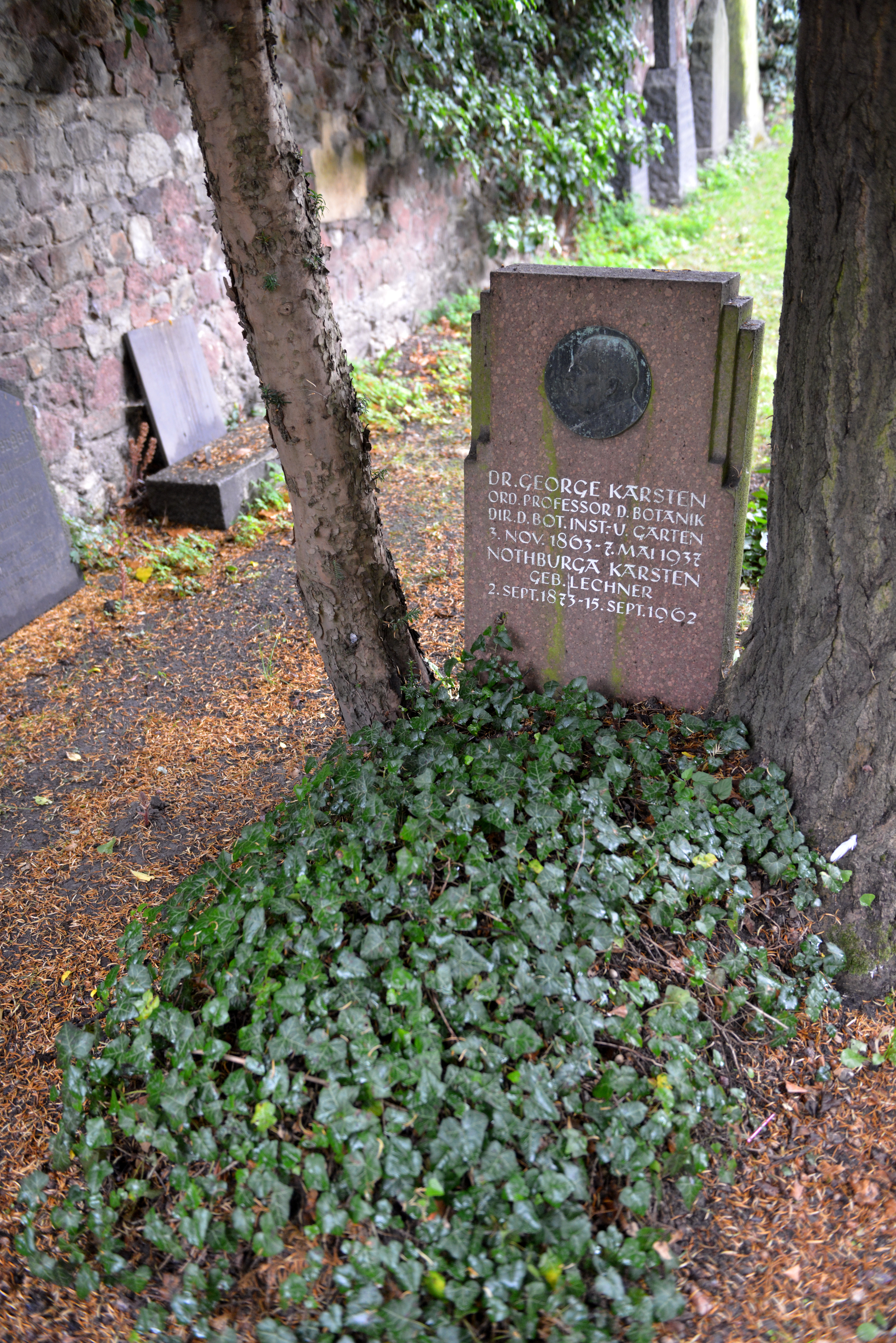 Laurentiusfriedhof Halle/Saale, Grab des Botanikers George Karsten The making of this document was supported by the Community-Budget of Wikimedia Germany.